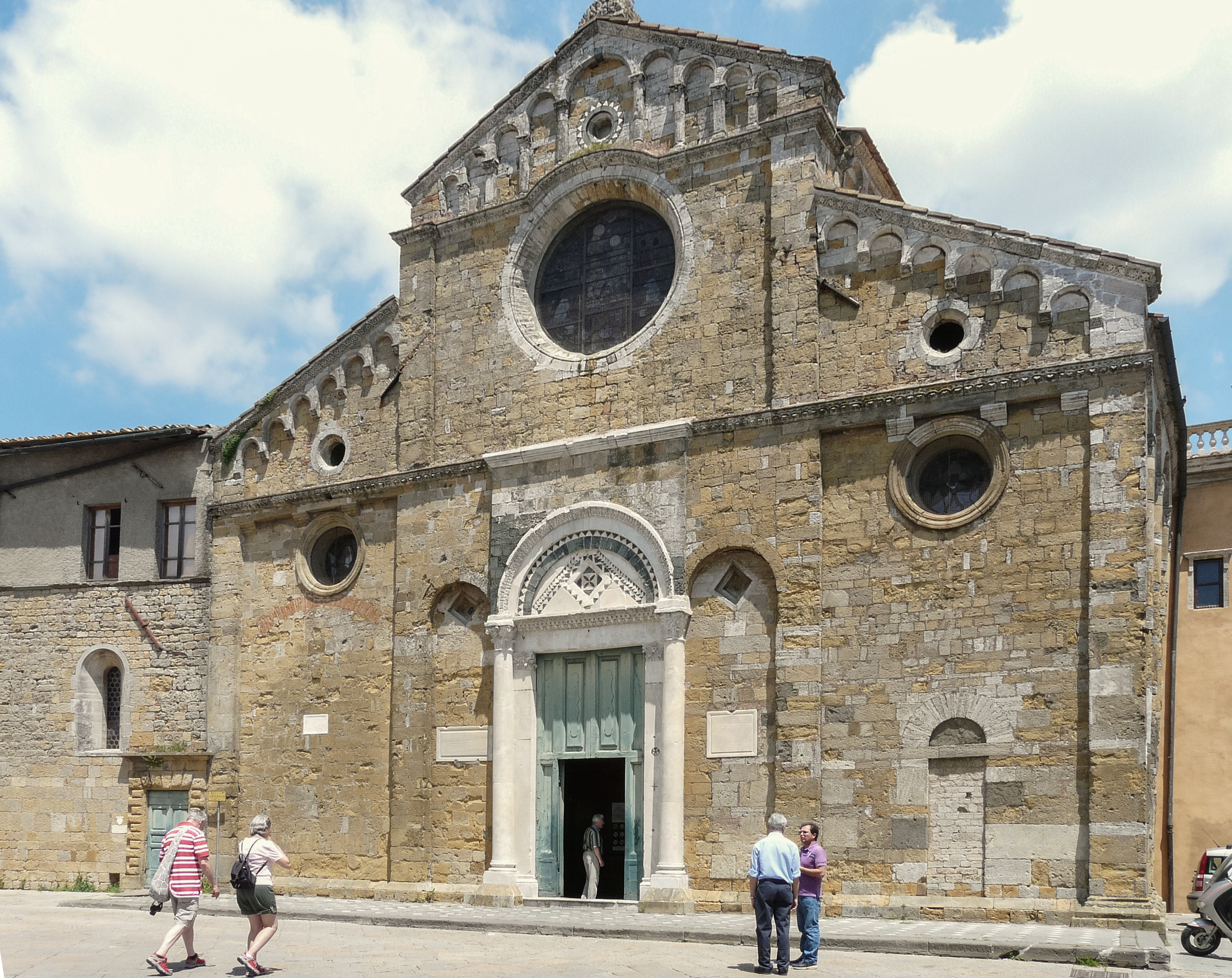 Cattedrale di Santa Maria Assunta, Volterra, Toscana, Italia